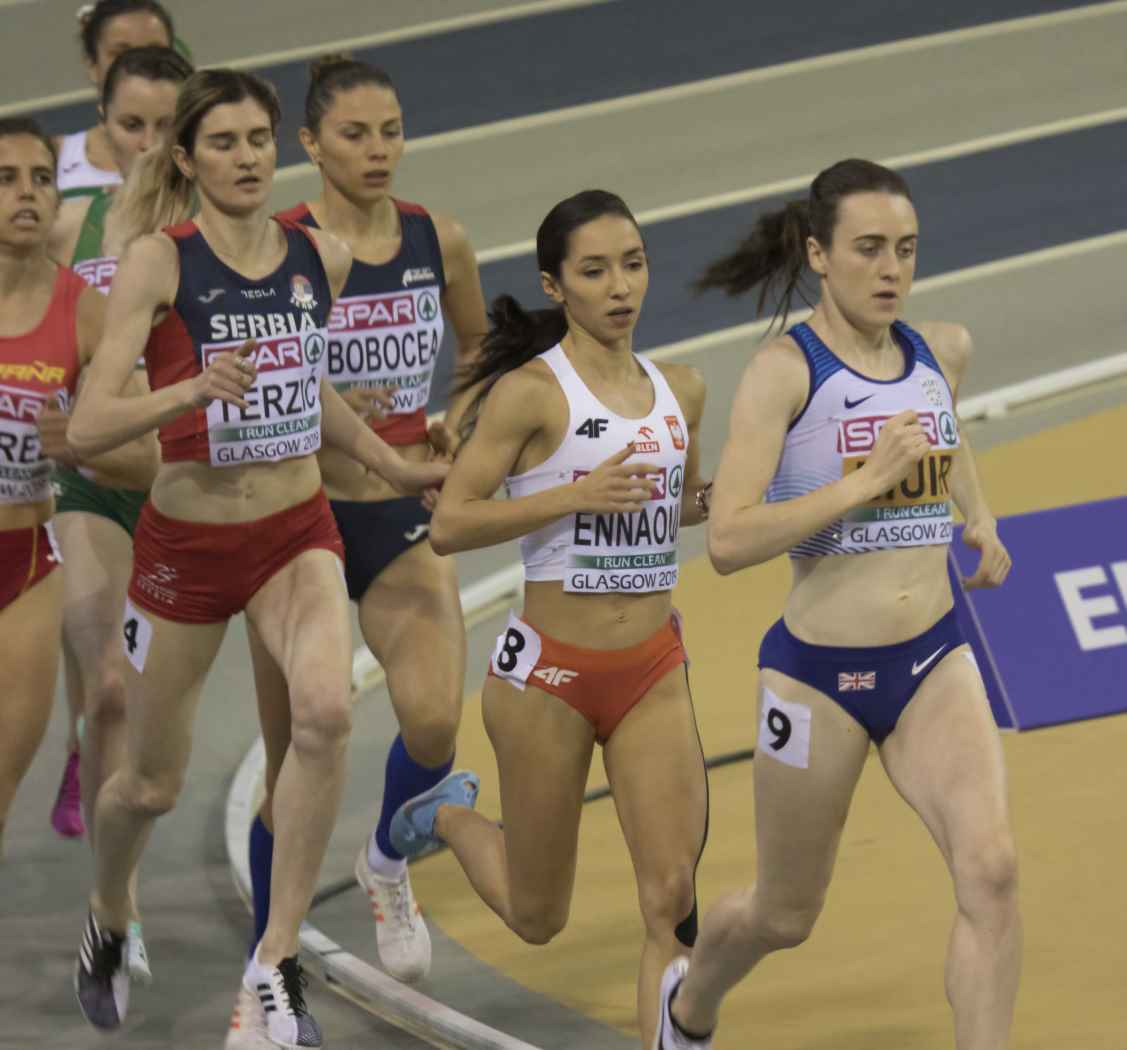 EKI30540 1500m dames muir